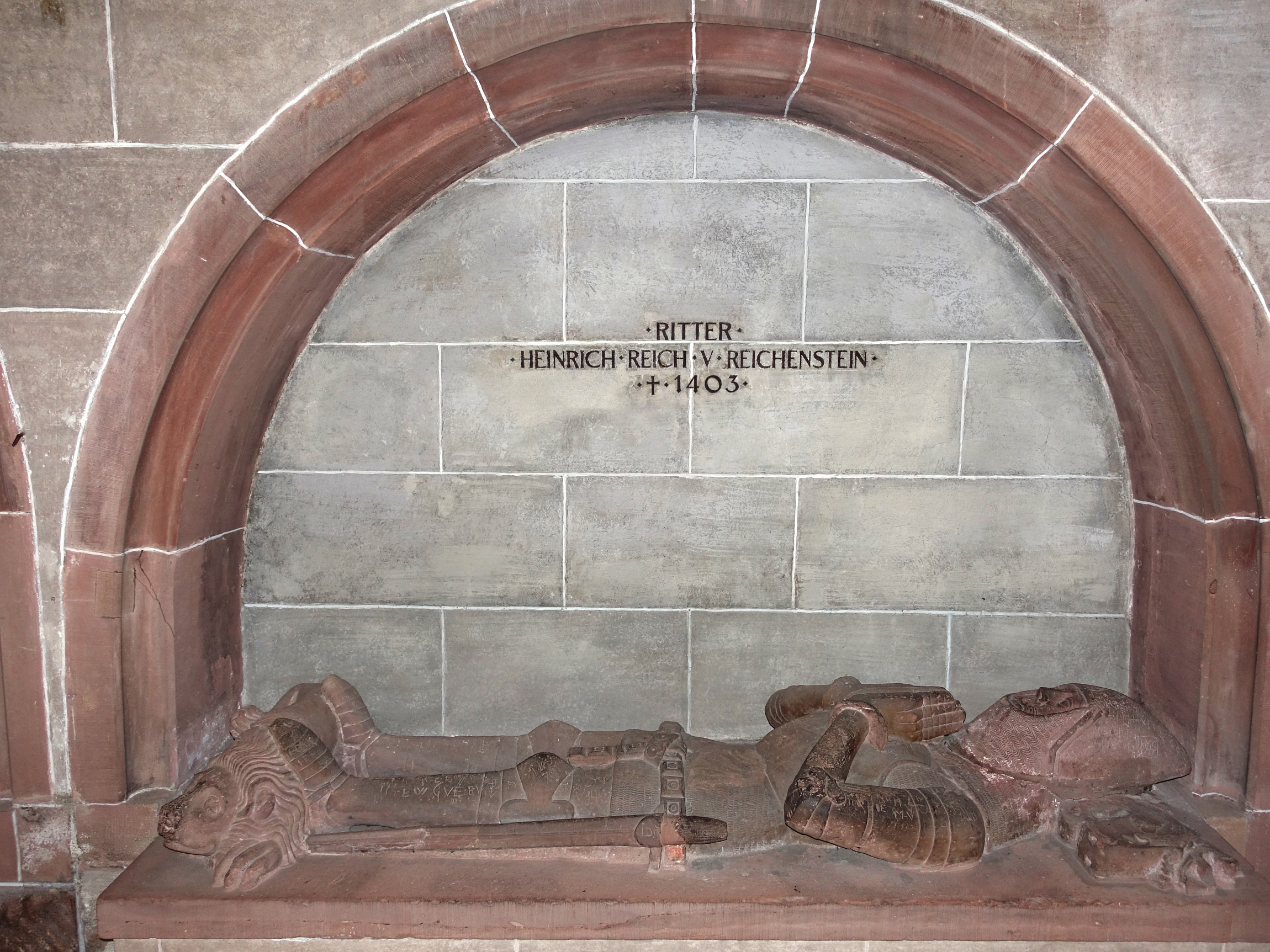 Heinrich Reich von Reichenstein (gestorben 1403). Spätgotisches Figurengrabmal im Basler Münster